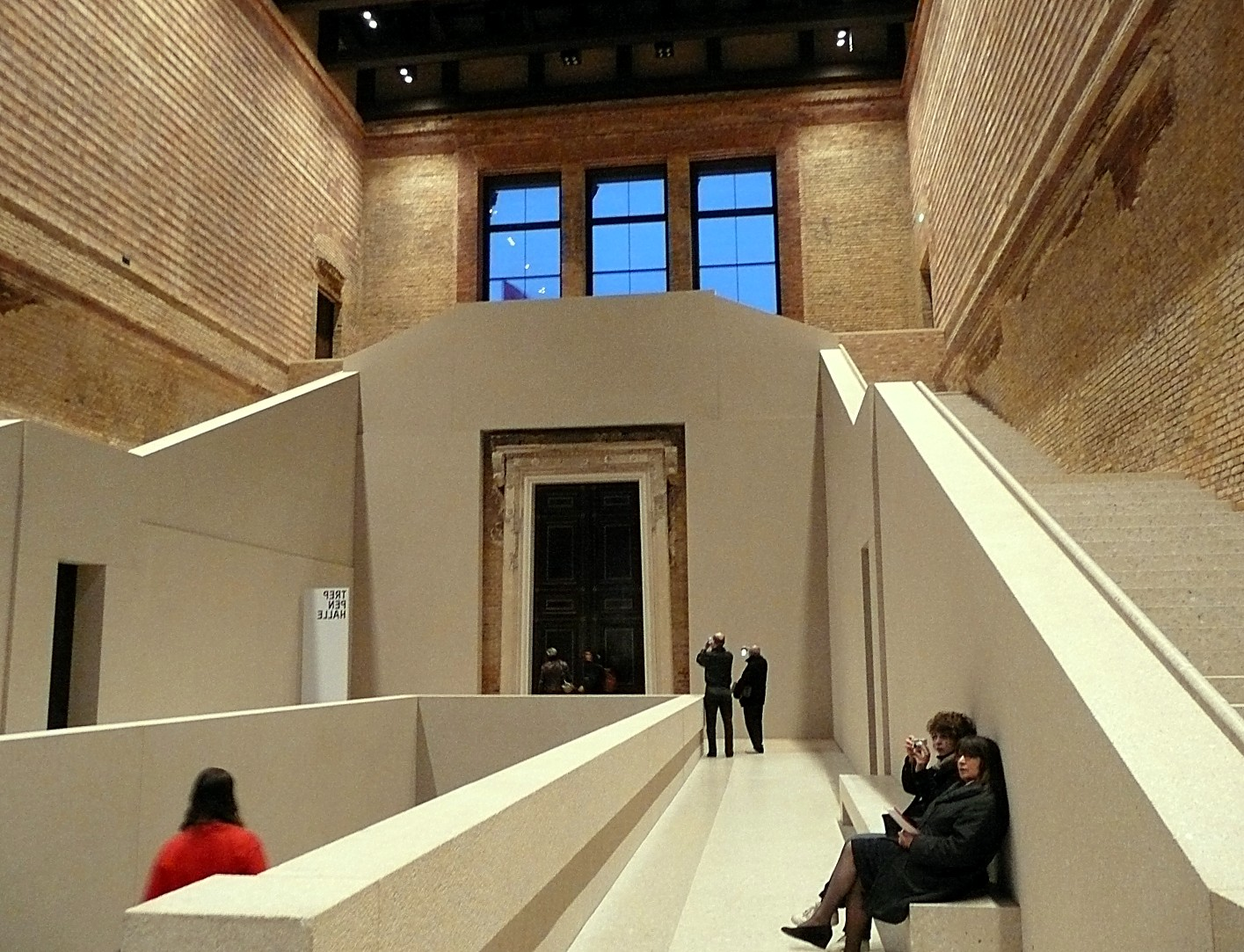 Neues Museum Berlin nach Rekonstruktion im März 2009